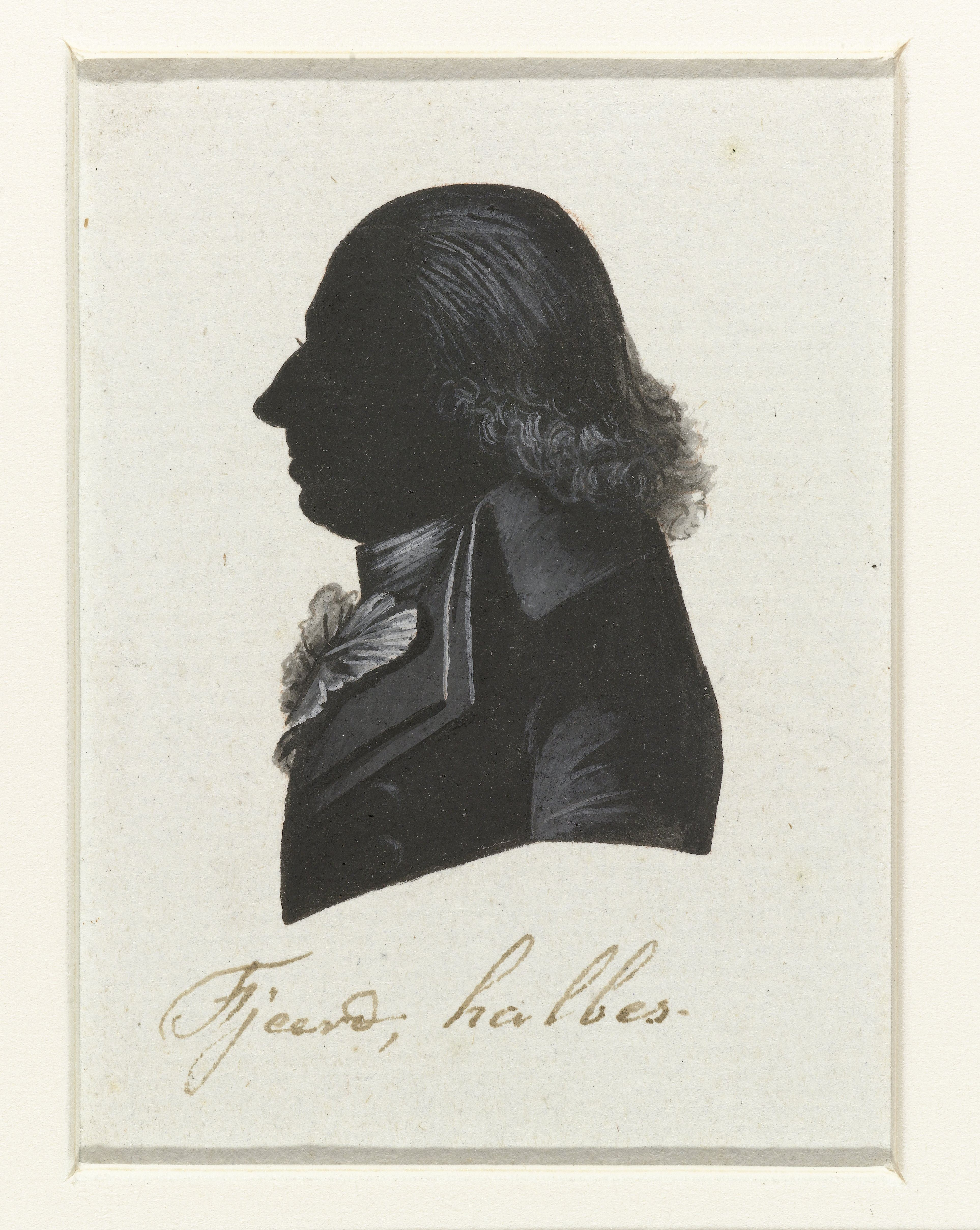 T. Halbes. Tekening in Oost-Indische inkt, waarschijnlijk gemaakt door Hausdorff. De tekening behoort tot een serie van portretten van afgevaardigden naar de Eerste Nationale Vergadering in 1796-1797. Van de serie werden gravures gemaakt die zijn afgedrukt in "Geschiedenis der staatsregeling, voor het Bataafsche volk", een boek van Cornelius Rogge (1799).